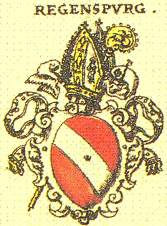 Wappen des Bistums Regensburg nach Siebmachers Wappenbuch